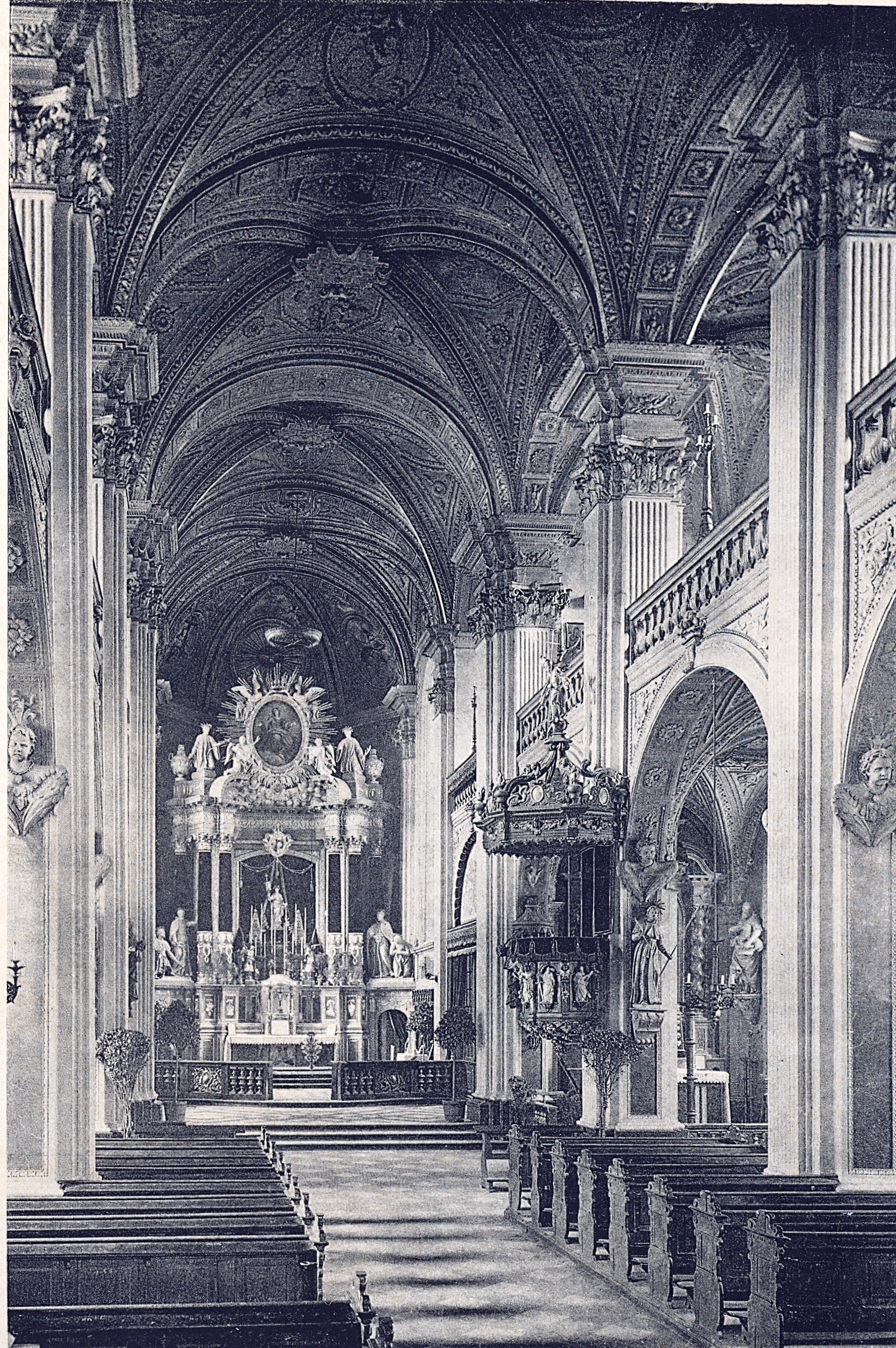 t